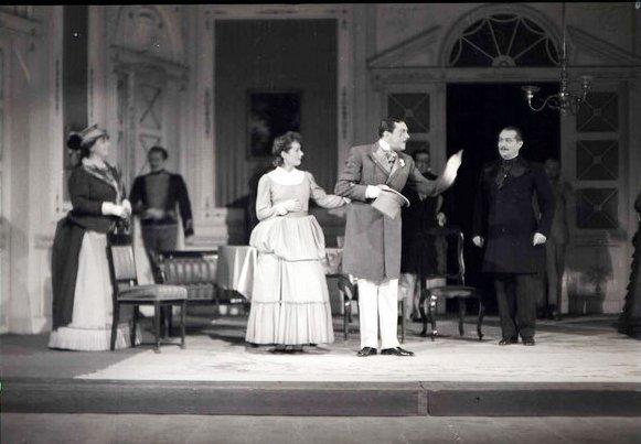 Tóth Kálmán: Nők az alkotmányban. Társulat: Nemzeti Színház, Budapest. Bemutató: 1939.09.30. Rendező: Galamb Sándor m. v. Szereplők: Pitvarosné: M. Iványi Irén, János: Ujlaky László, Ilka: Somogyi Erzsi, Br. Szlankoményi: Pethes Sándor, Bercsei Vilmos: Abonyi Géza.